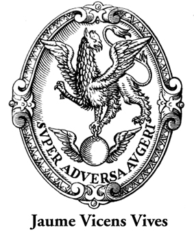 L'ex-libris del fons Jaume Vicens Vives prové del logotip imprès en els papers de carta de Jaume Vicens Vives. En ell s'observa la imatge d'una au fènix que reneix de les seves cendres. En la llegenda que apareix a sota es pot llegir "super adversa augeri", és a dir, en l'adversitat, aixeca't